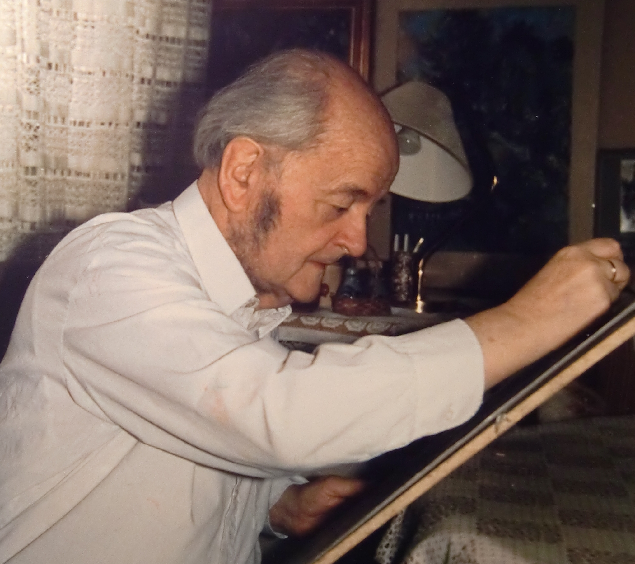 Porträt des Künstlers